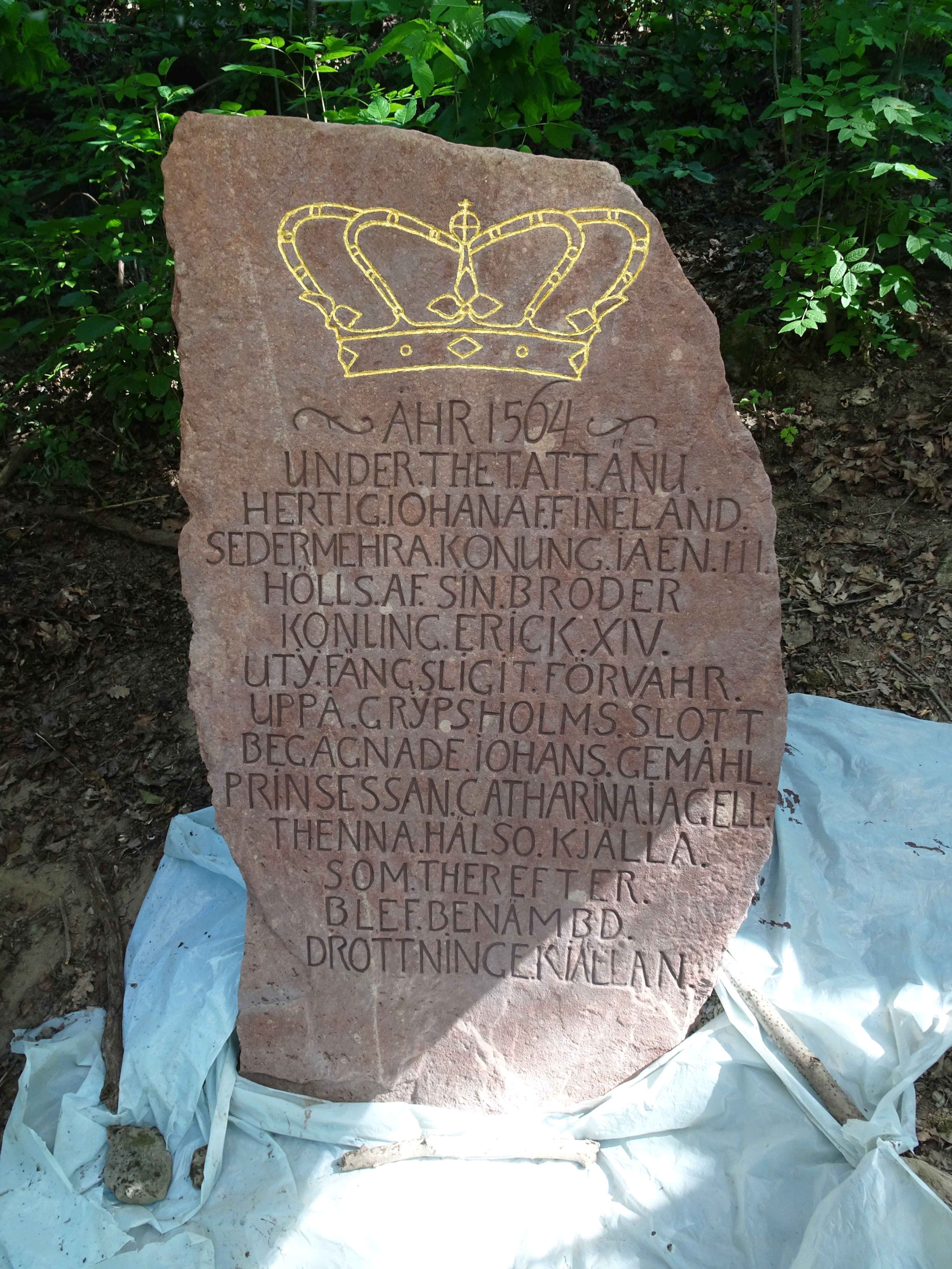 Drottningkällans minnessten